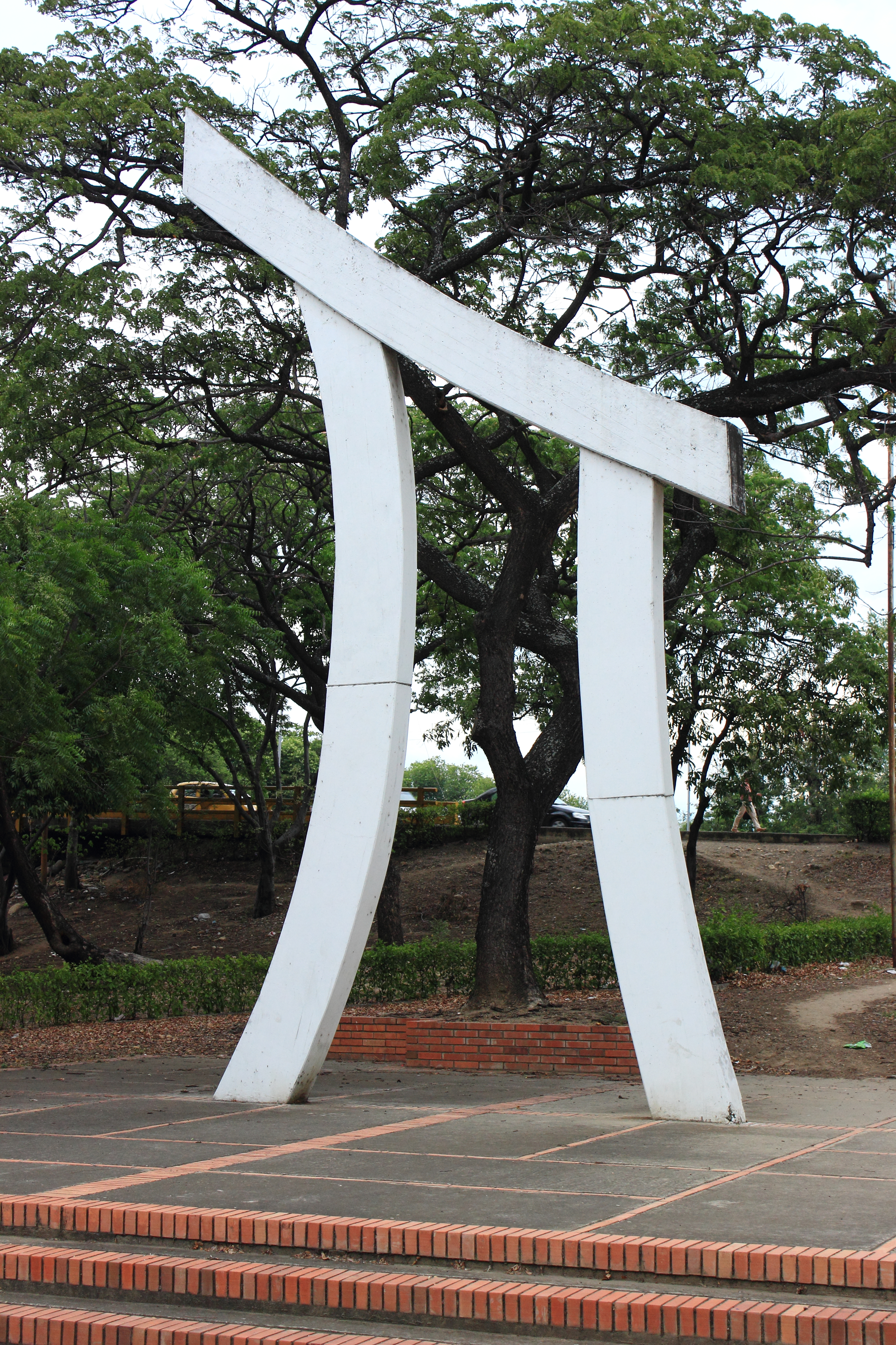 Monumento Pi construido por la Sociedad Norte Santandereana de ingenieros ubicado entre la Avenida Libertadores y La Diagonal Santander